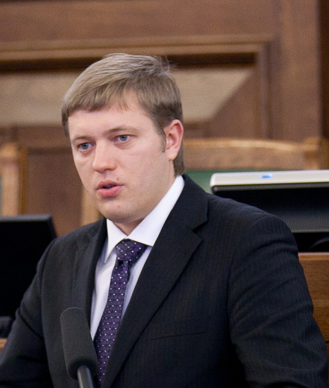 2011.gada 17.oktobris. Deputāts Dāvis Stalts dod svinīgo solījumu. Foto: Ernests Dinka, Saeimas Kanceleja